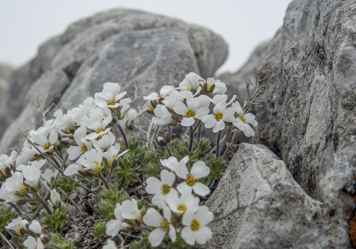 Draba dedeana Boiss.&Reut. (crucífera), en el Parque Natural de Somiedo (Asturias). Endemismo español.